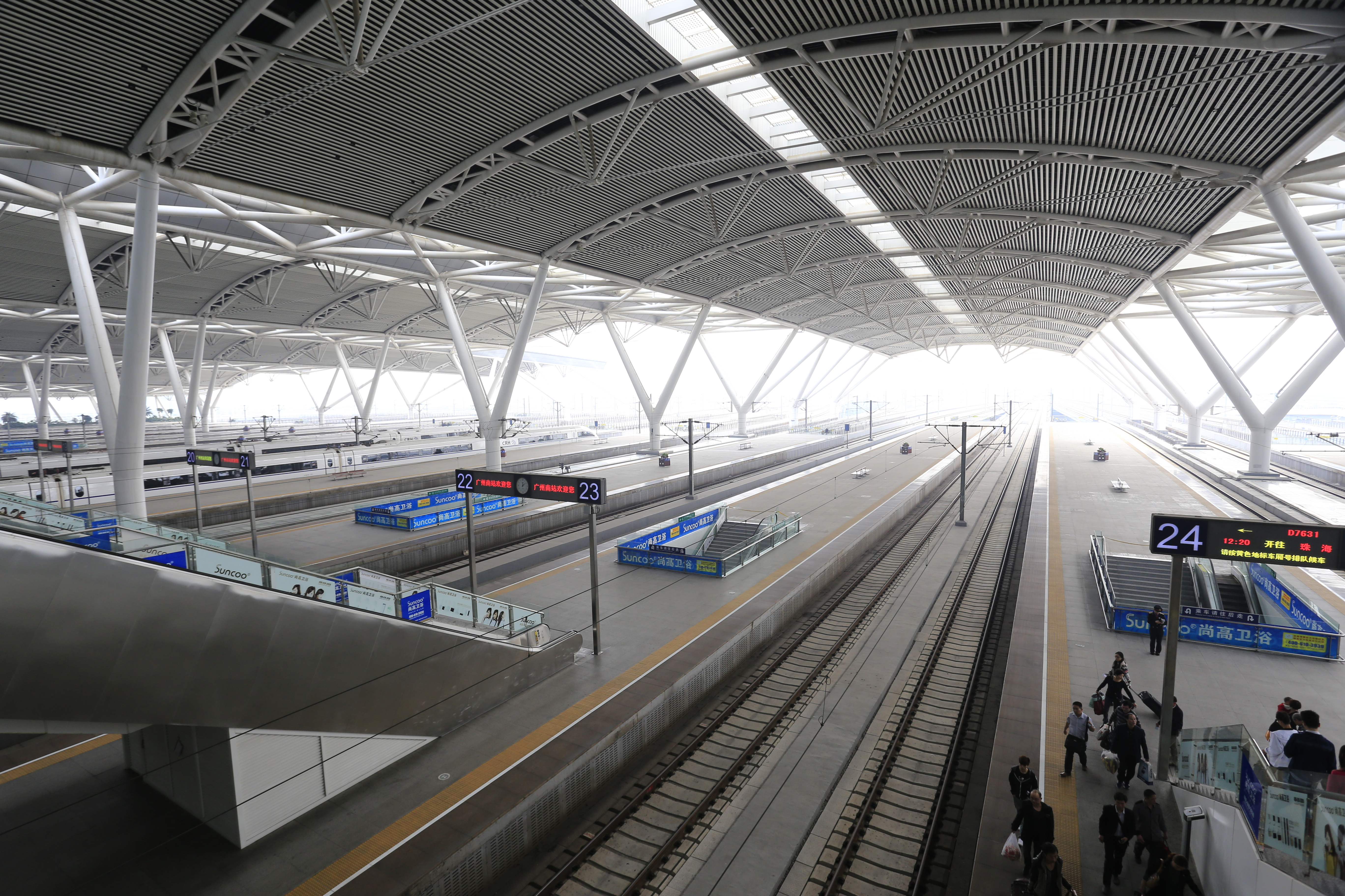 广州南站